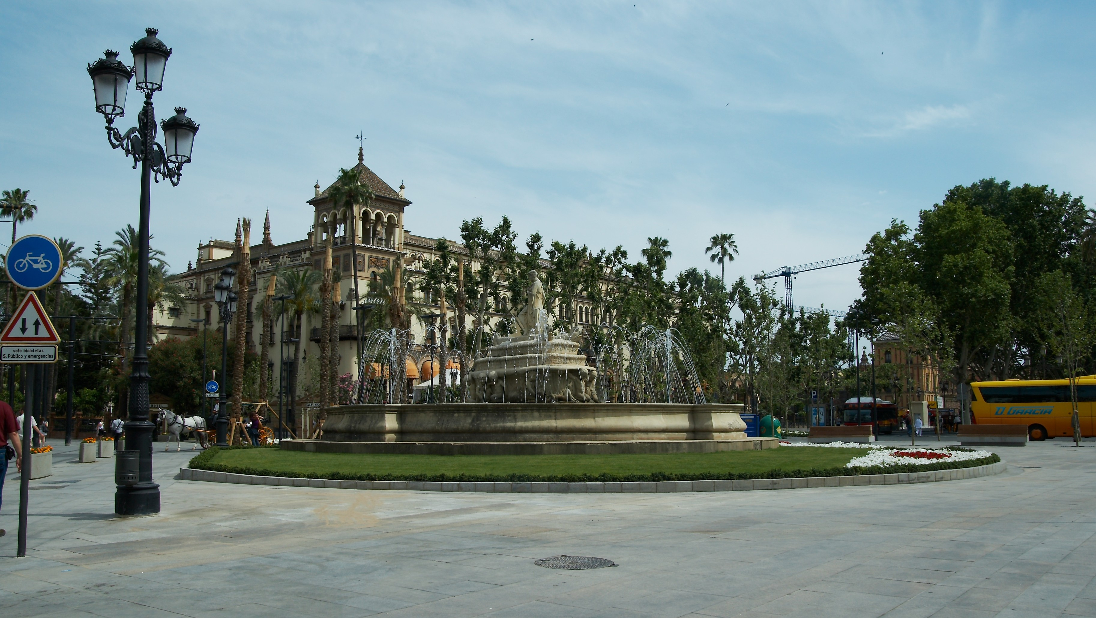 Puerta de Jerez, Sevilla, España.